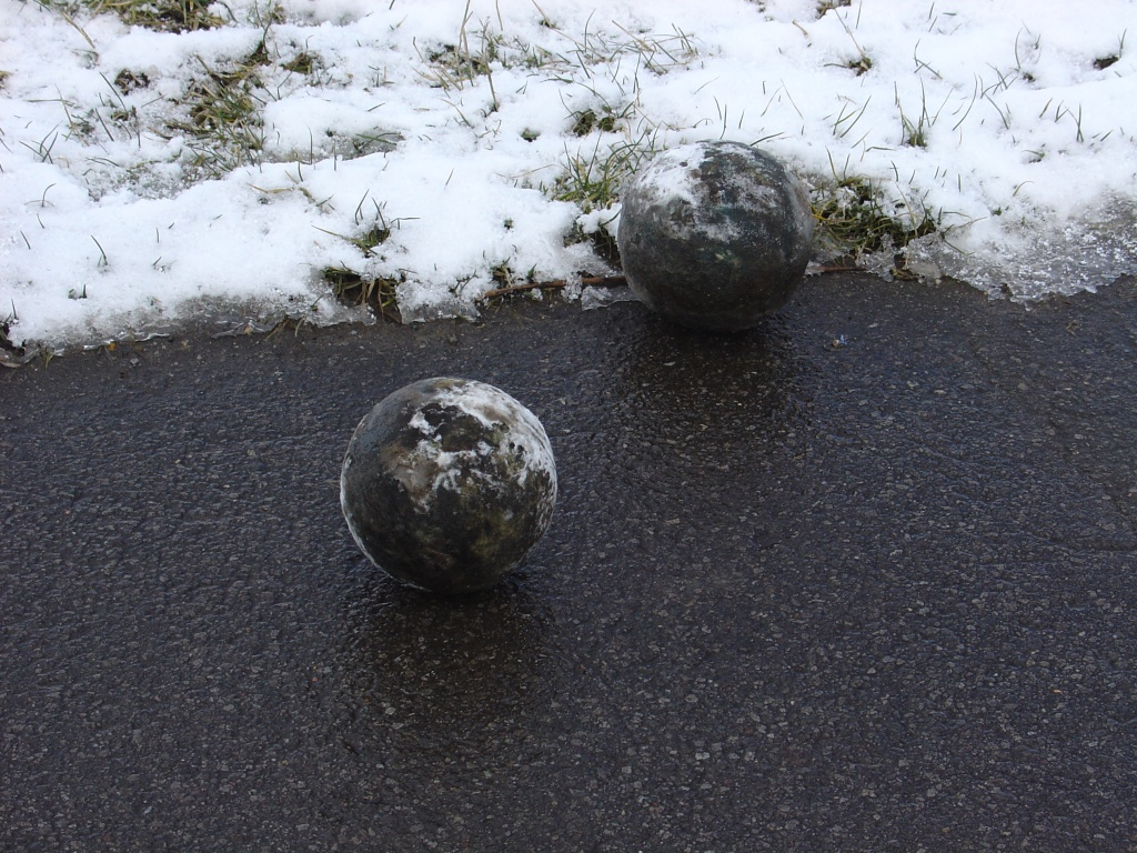 Boßelkugeln